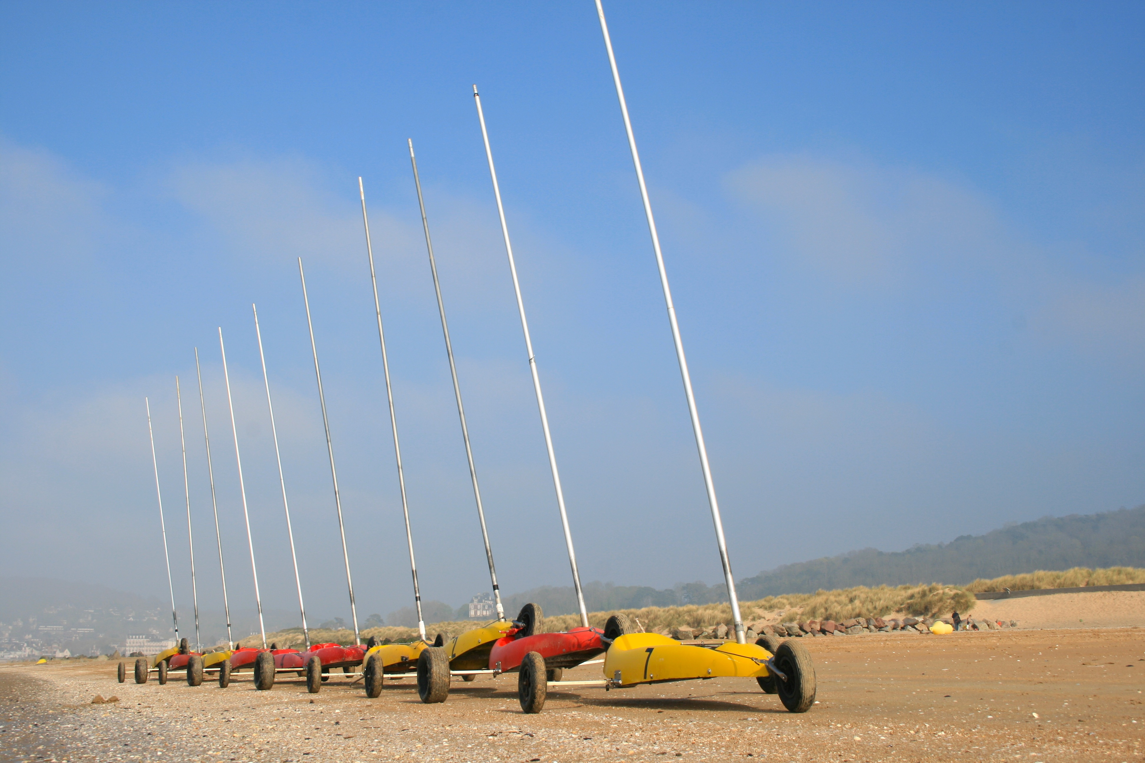 Chars à voile sur la plage de Cabourg.